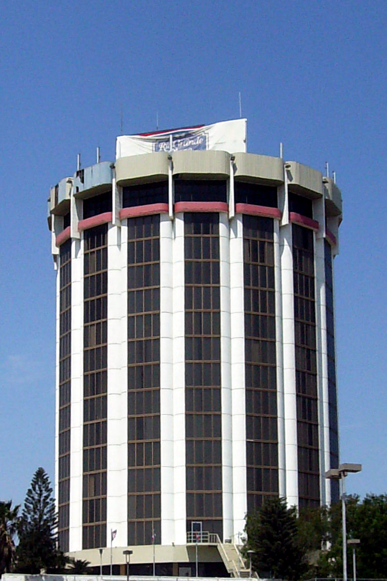 Rio Grande Plaza in Laredo, Texas